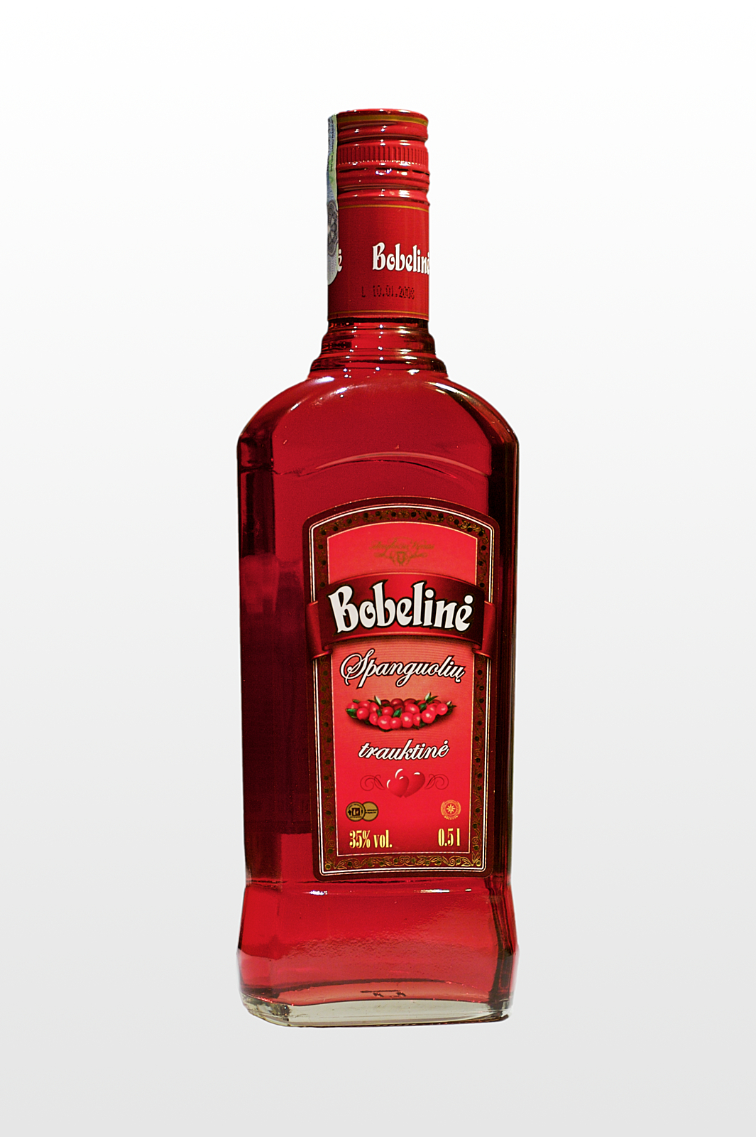 Anykščių Vynas Bobelinė - 35% vol. 0.5L bottle